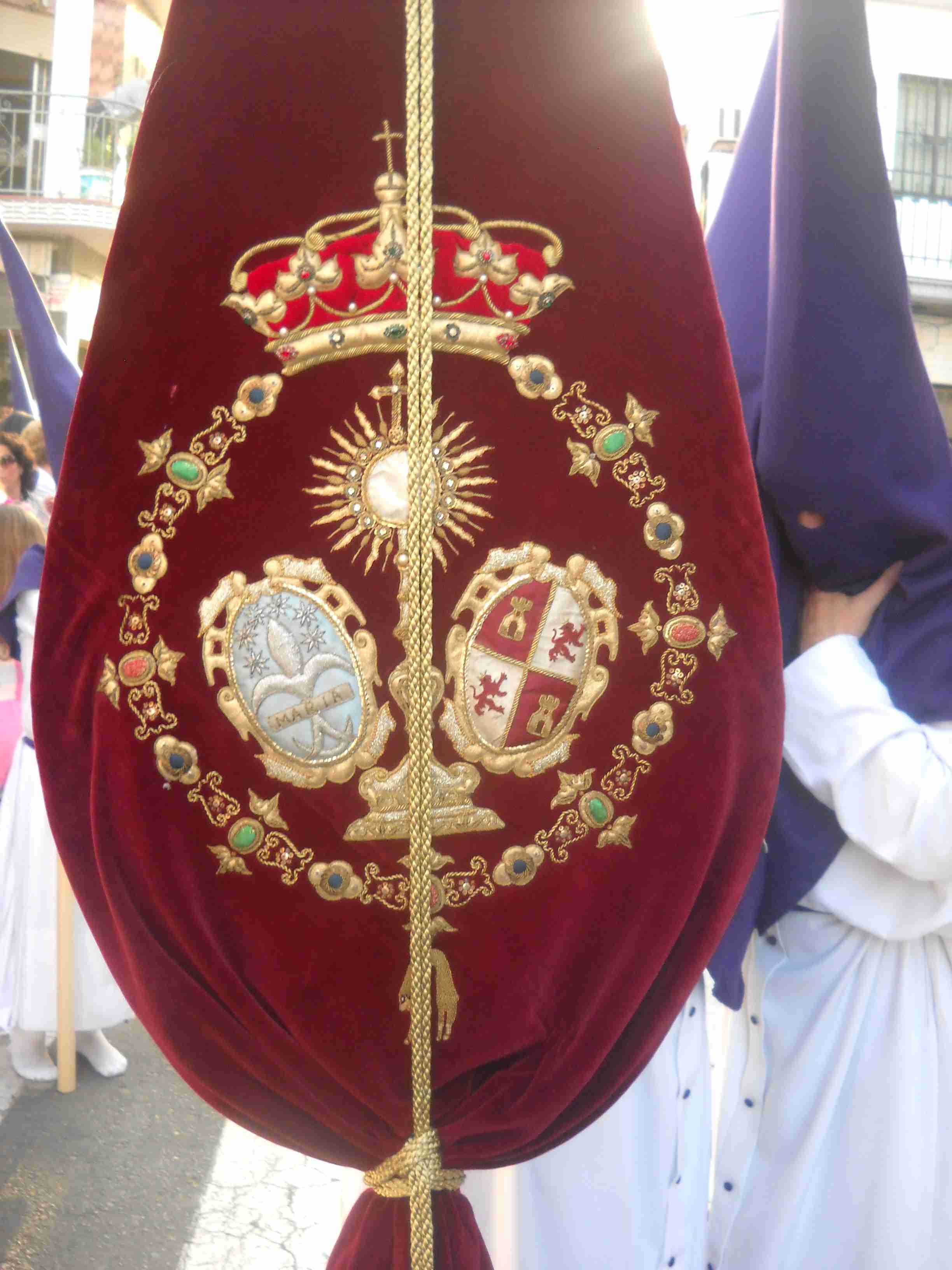 Escudo que aparece en el bacalao de la Hermandad